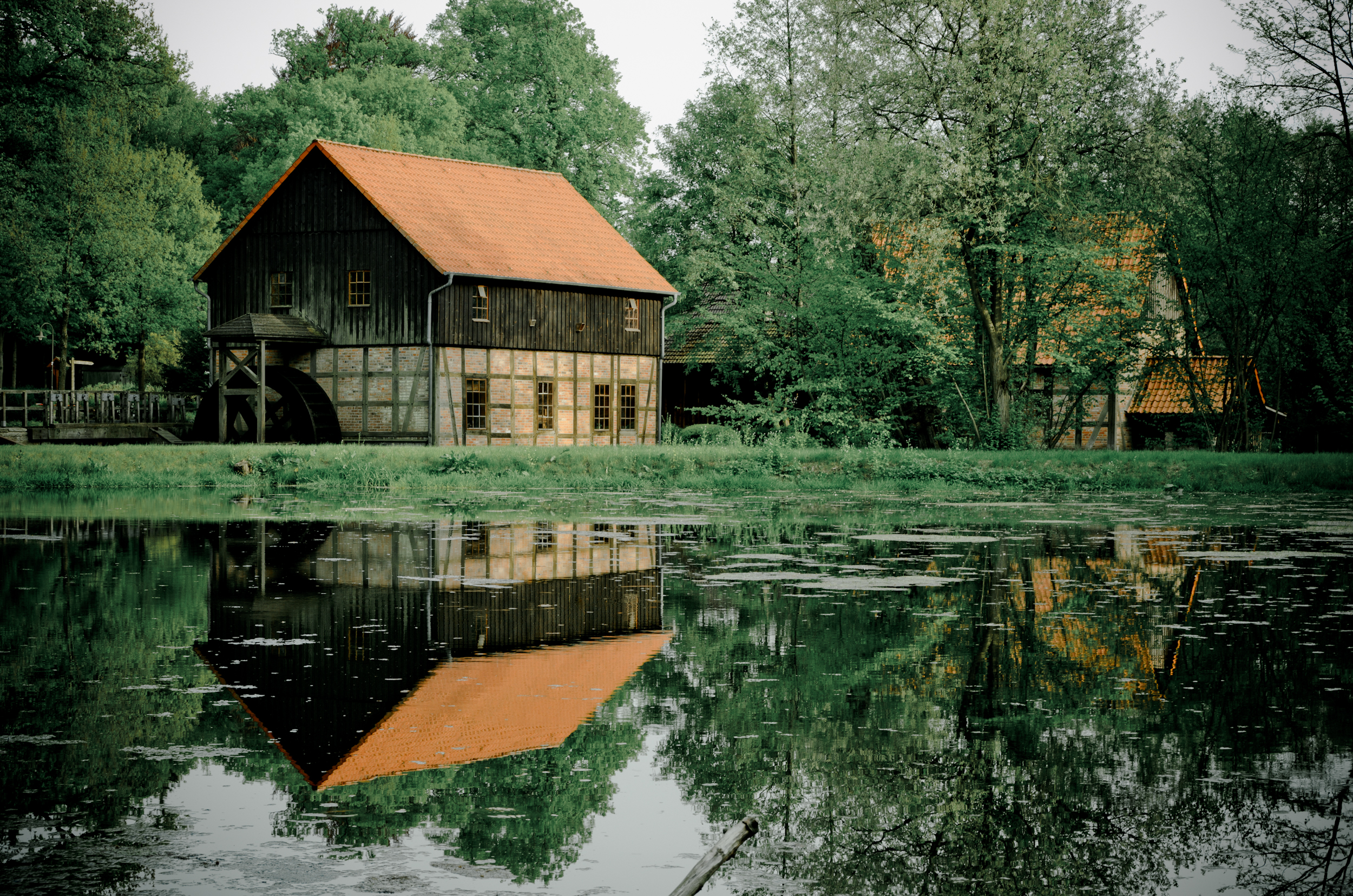 Die Cordinger Mühle an der Warnau in Benefeld (Lüneburger Heide, Deutschland)